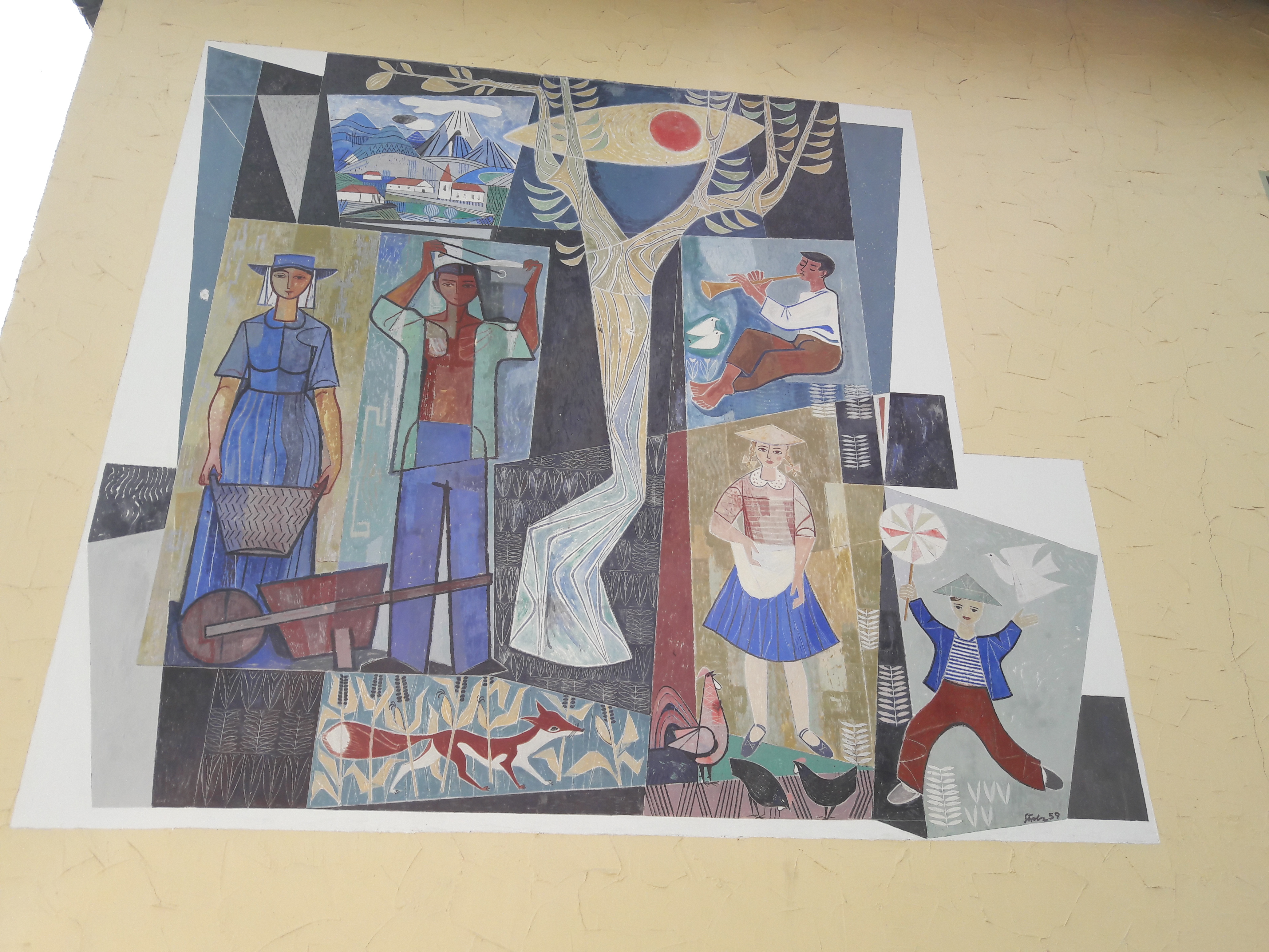 Volksschule Schönwies. Fresko von Norbert Strolz aus dem Jahre 1959.